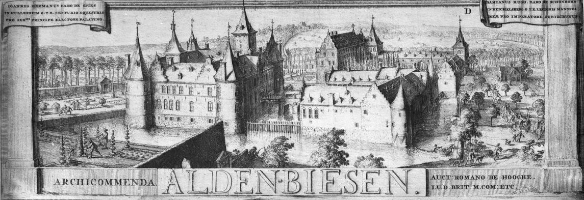 Twee tekeningen van Romeyn de Hooge. Boven: Landscommanderij Alden Biesen van de Duitse Orde. Onder: zicht op Maastricht met werven langs de Maasoever.